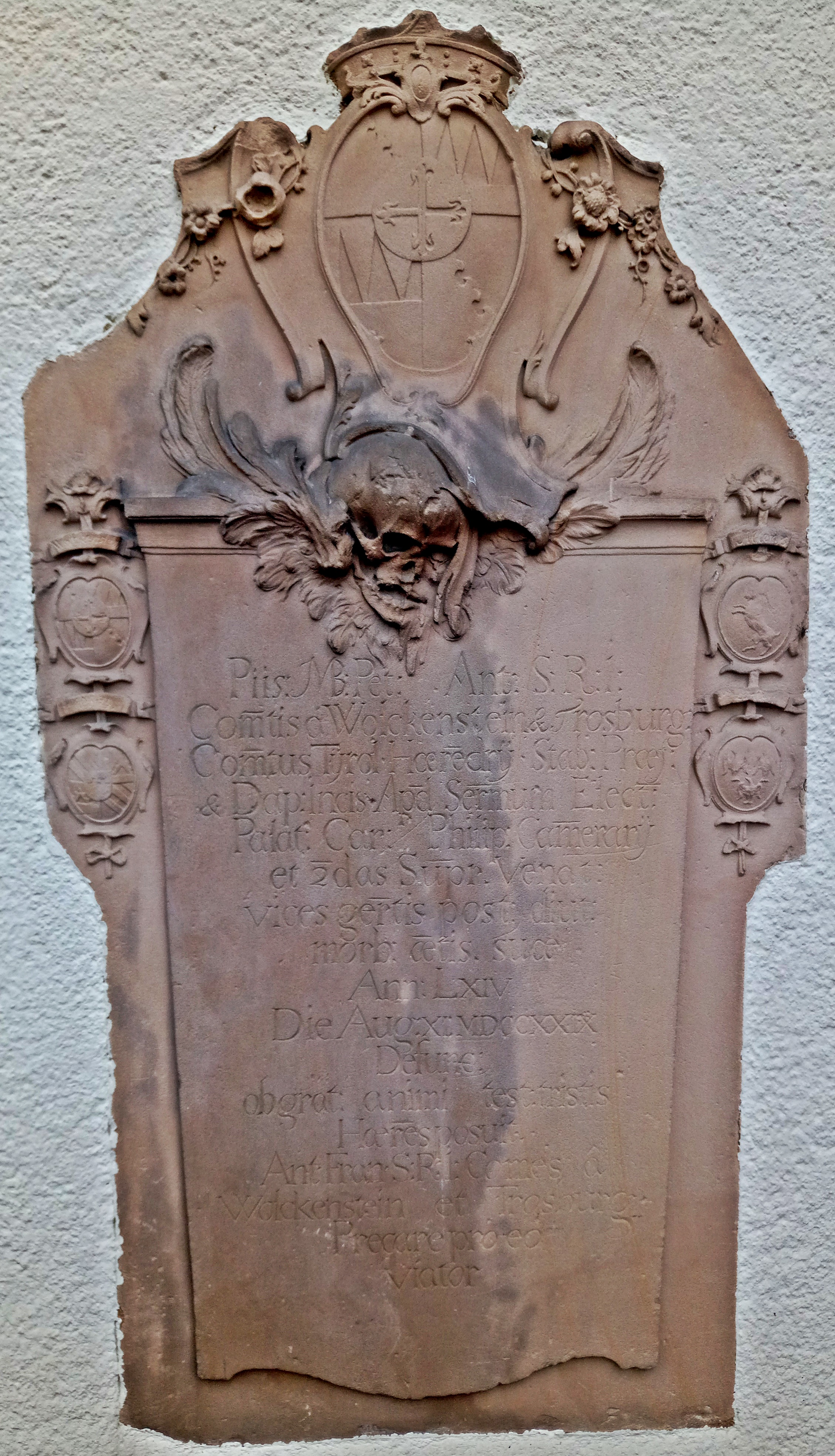 Schwetzingen Wolkenstein Epitaph St Pankratius Kirche (Peter Anton von Wolkenstein-Trostburg, † 1729)